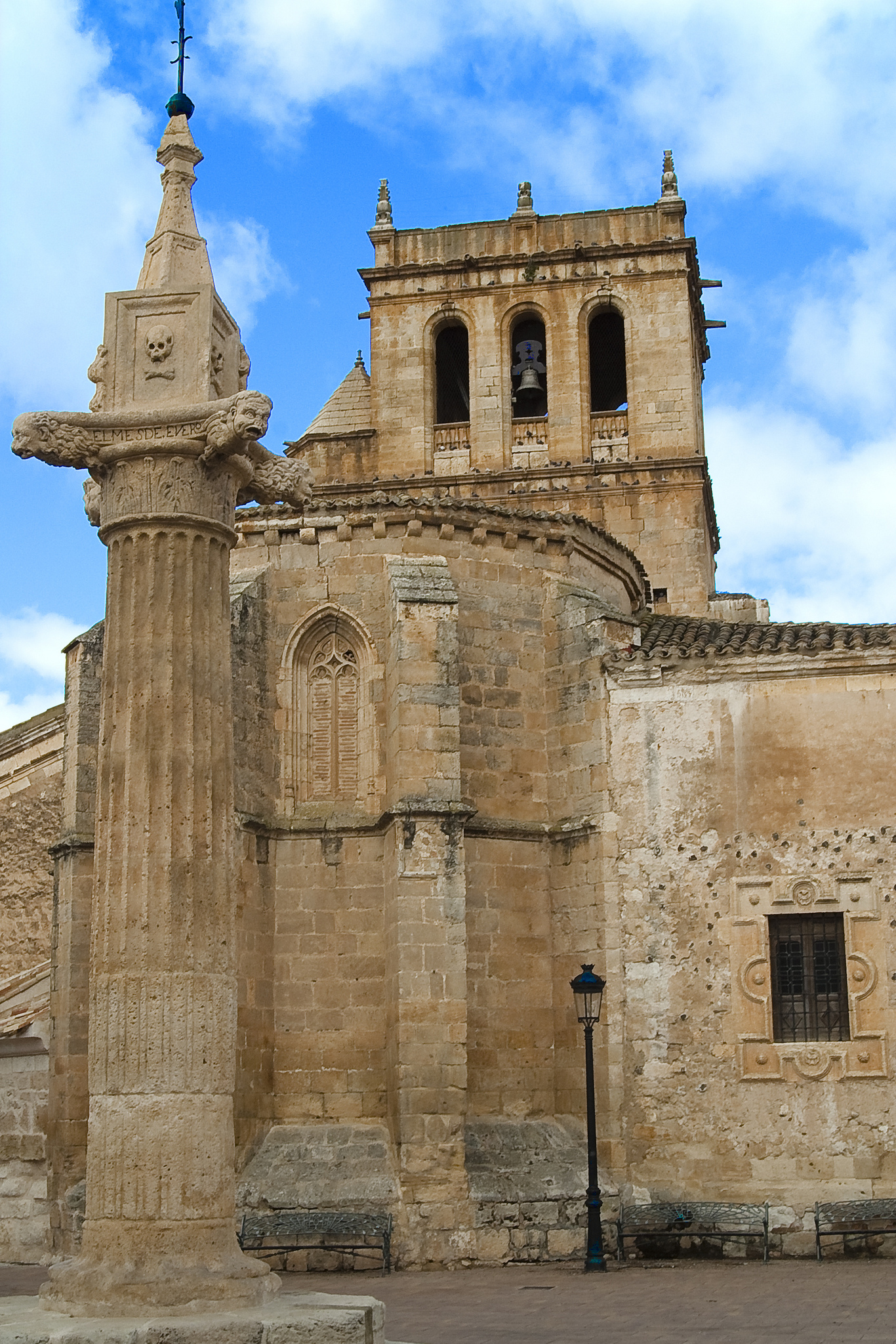 BIC=RI-53-0000658